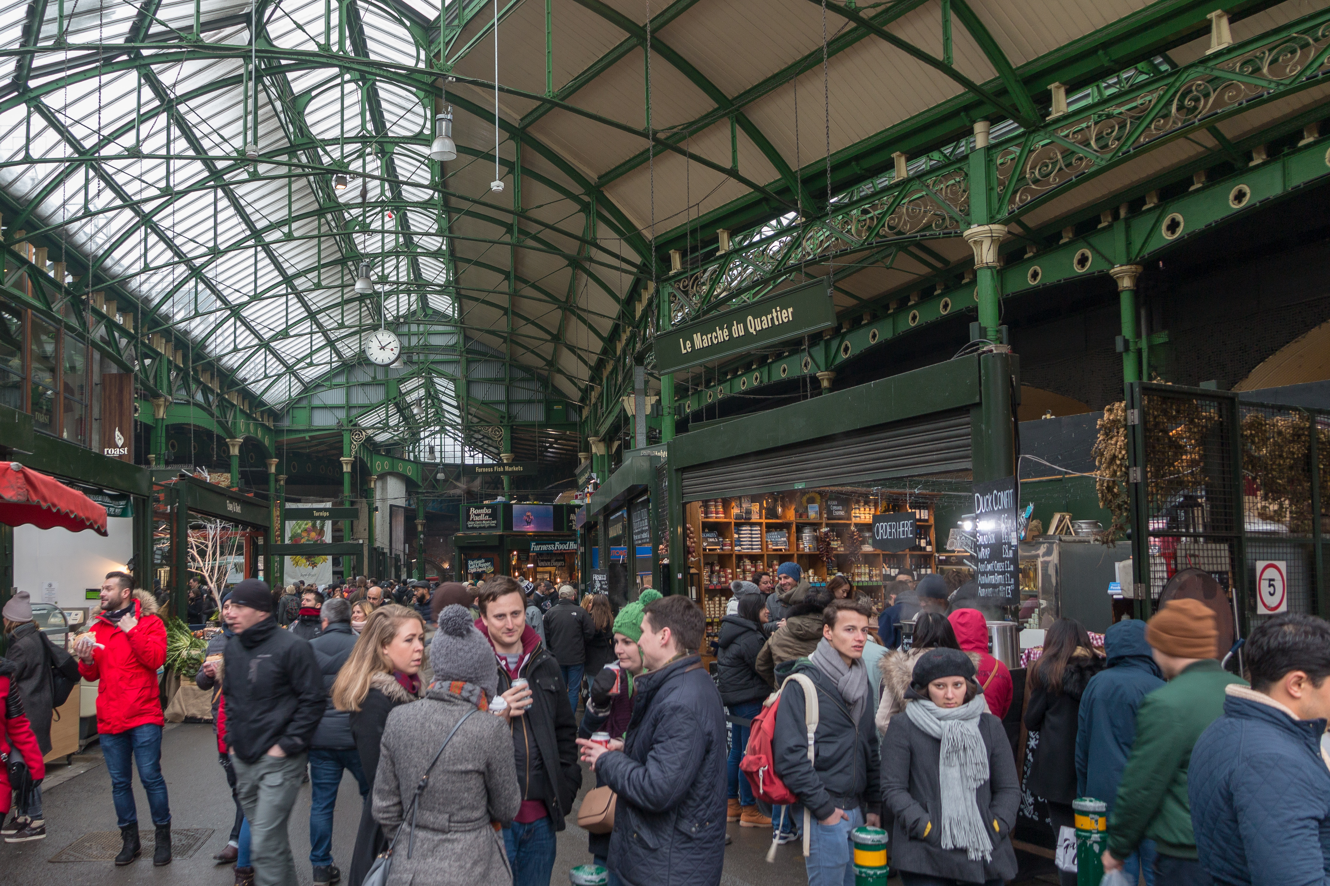 London March 2018. See my profile for image use.